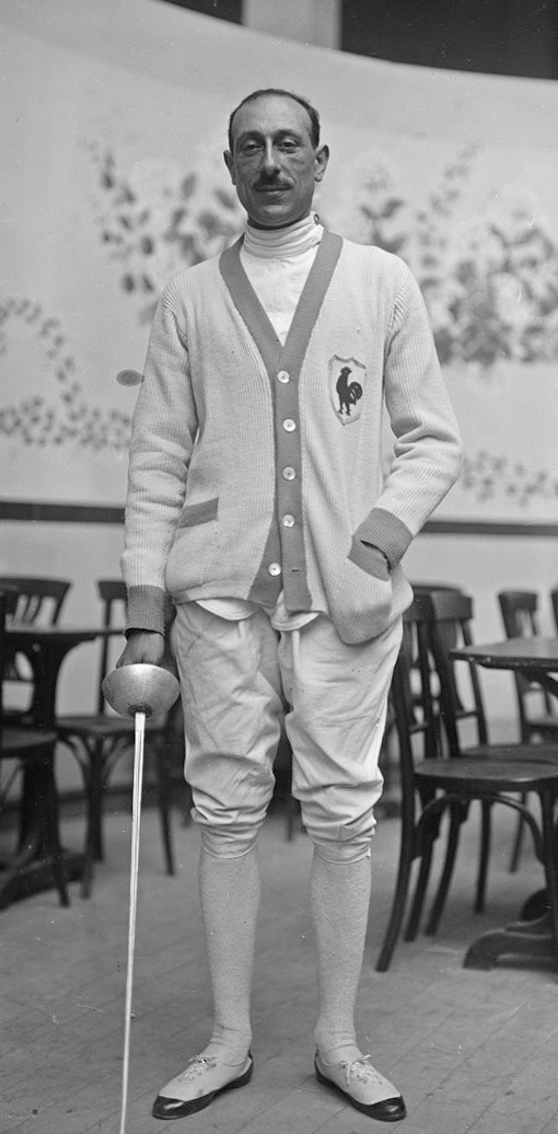 Ducret, Français [escrimeur, Luna Park, championnat d'Europe d'escrime, 16-17 juin 1922] : [photographie de presse] / [Agence Rol]